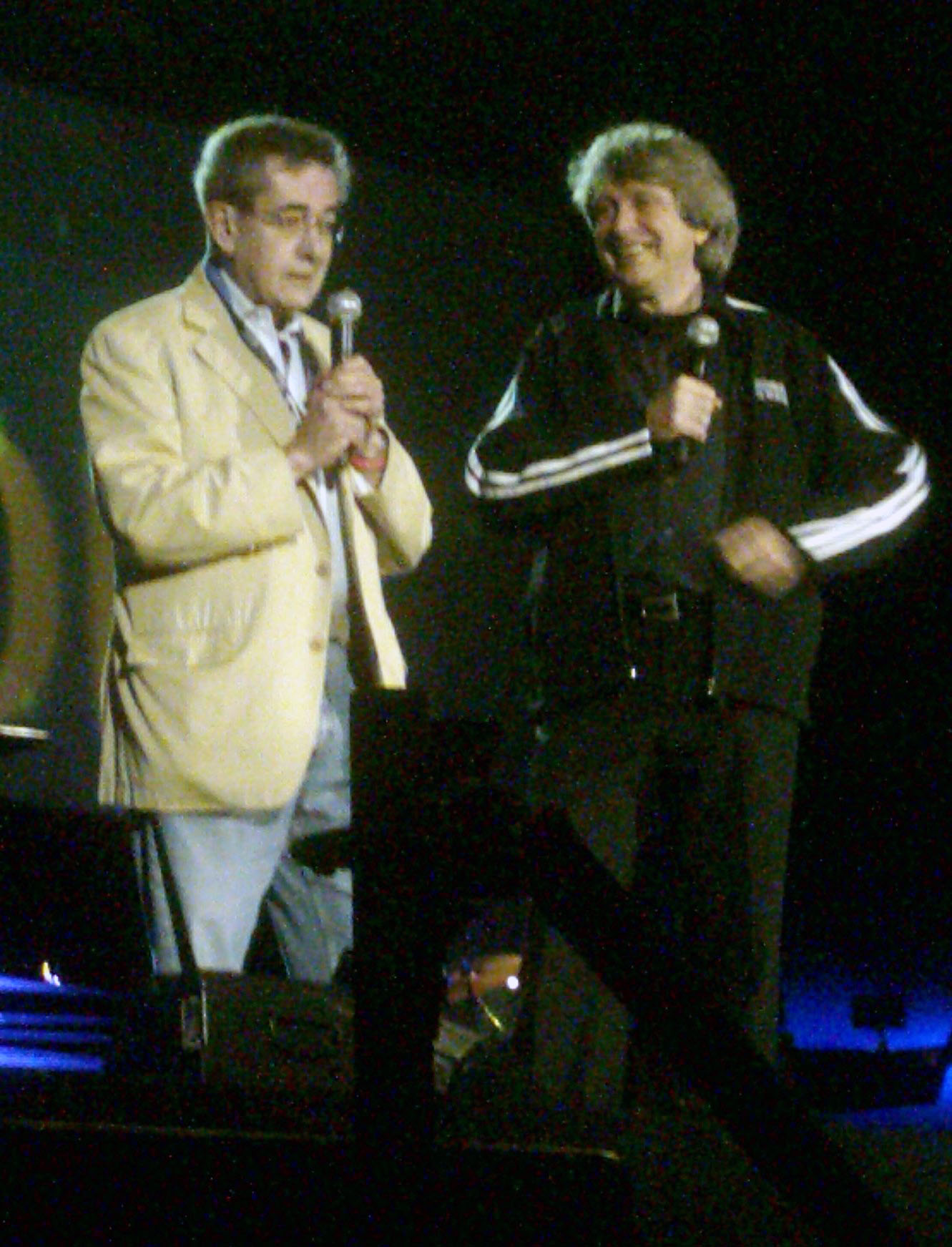 Guy Latraverse (à gauche) et Alain Simard, lors de la soirée d'ouverture de la 22e édition des FrancoFolies de Montréal, le 11 juin 2010, avant le spectacle offert par Diane Dufresne, Sinéquanone